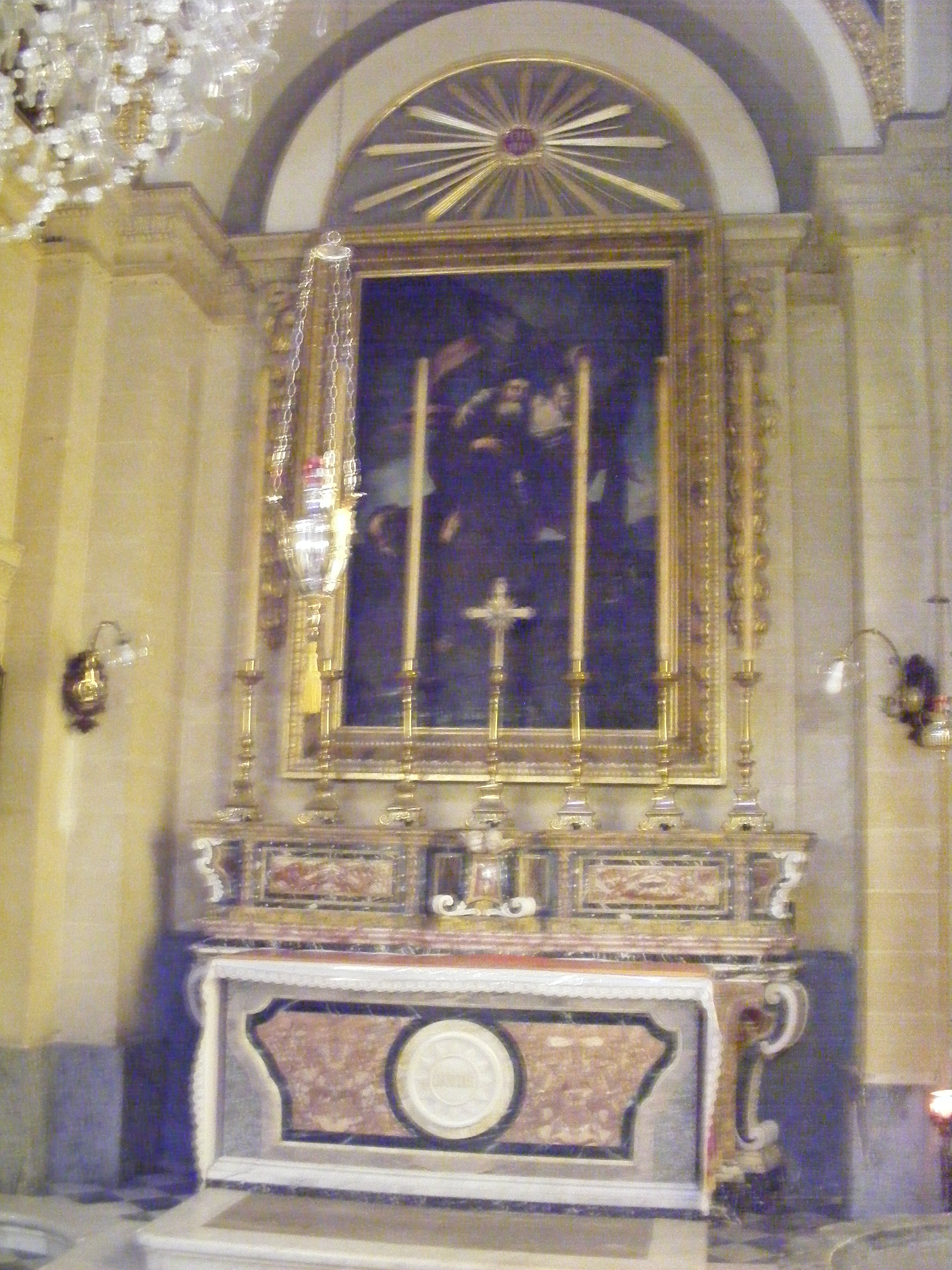 Ołtarz w ołtarzu kaplicy św. Franciszka z Paoli pochodzi z początku XVIII wieku, przedstawia "Cudowne przejście św. Franciszka". Jego autorstwo przypisywane jest Giuseppe D'Arenie lub Stefano Erardiemu.